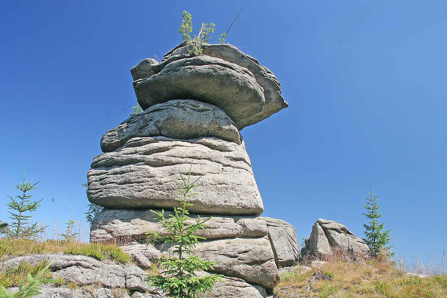 Skalní útvar Houba u Pytláckých kamenů, Jizera Mountains, Czech Republic Autor:Prazak Date: 18. 7. 2006